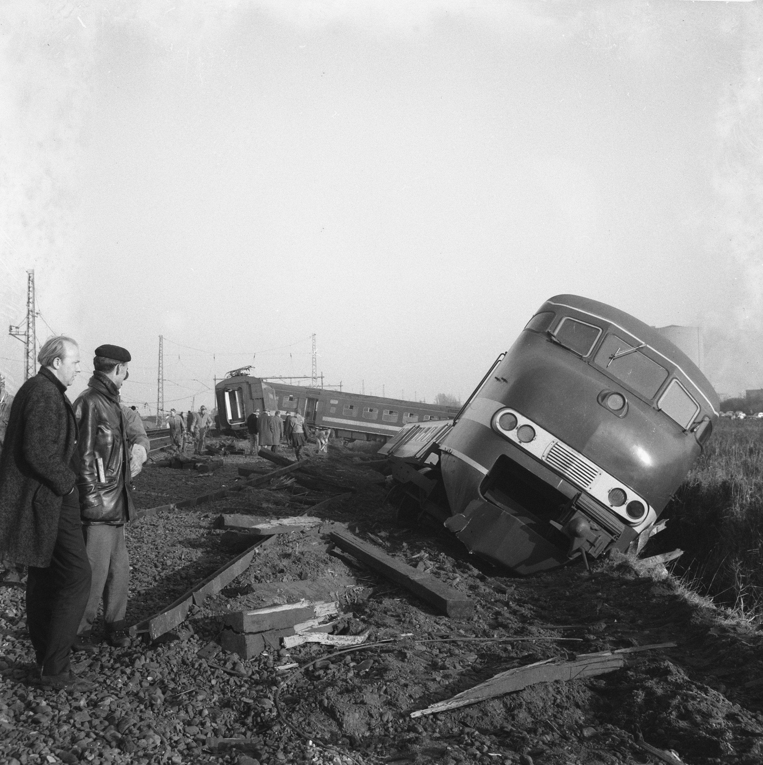 Collectie / Archief : Fotocollectie Anefo Reportage / Serie : Ravage na de ontsporing van een personentrein ter hoogte van Halfweg Beschrijving : treinen, spoorwegongevallen Datum : 2 november 1966 Locatie : Halfweg, Noord-Holland Trefwoorden : spoorwegongevallen, treinen Fotograaf : Evers, Joost / Anefo Auteursrechthebbende : Nationaal Archief Materiaalsoort : Negatief (zwart/wit) Nummer archiefinventaris : bekijk toegang 2.24.01.03 Bestanddeelnummer : 919-7449